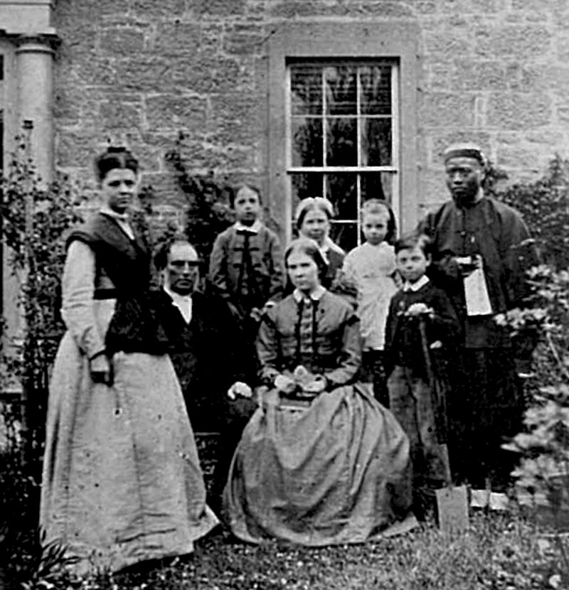 Legge-family-collection